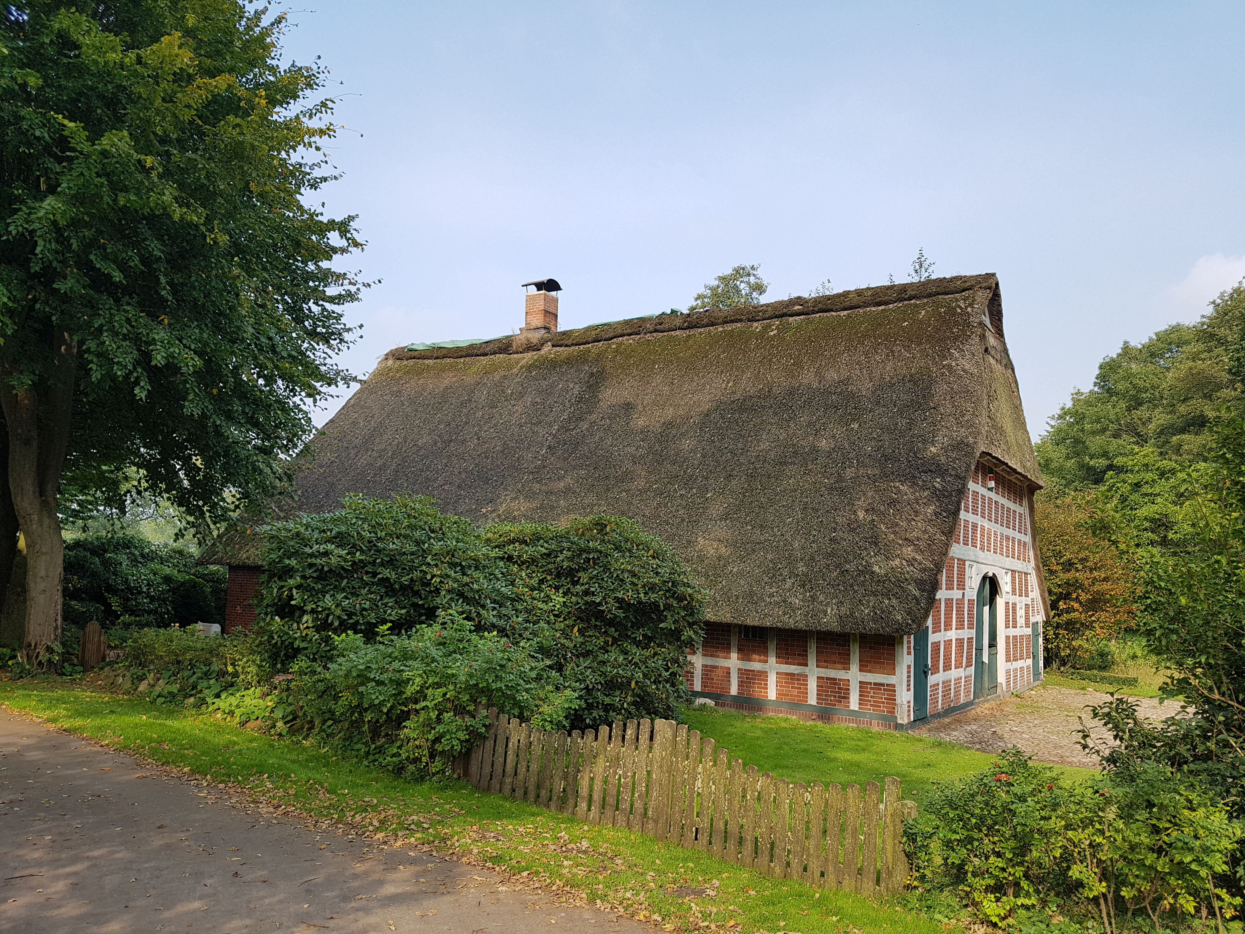 Ehmalig Buurnhuus in Lüttmöhlen